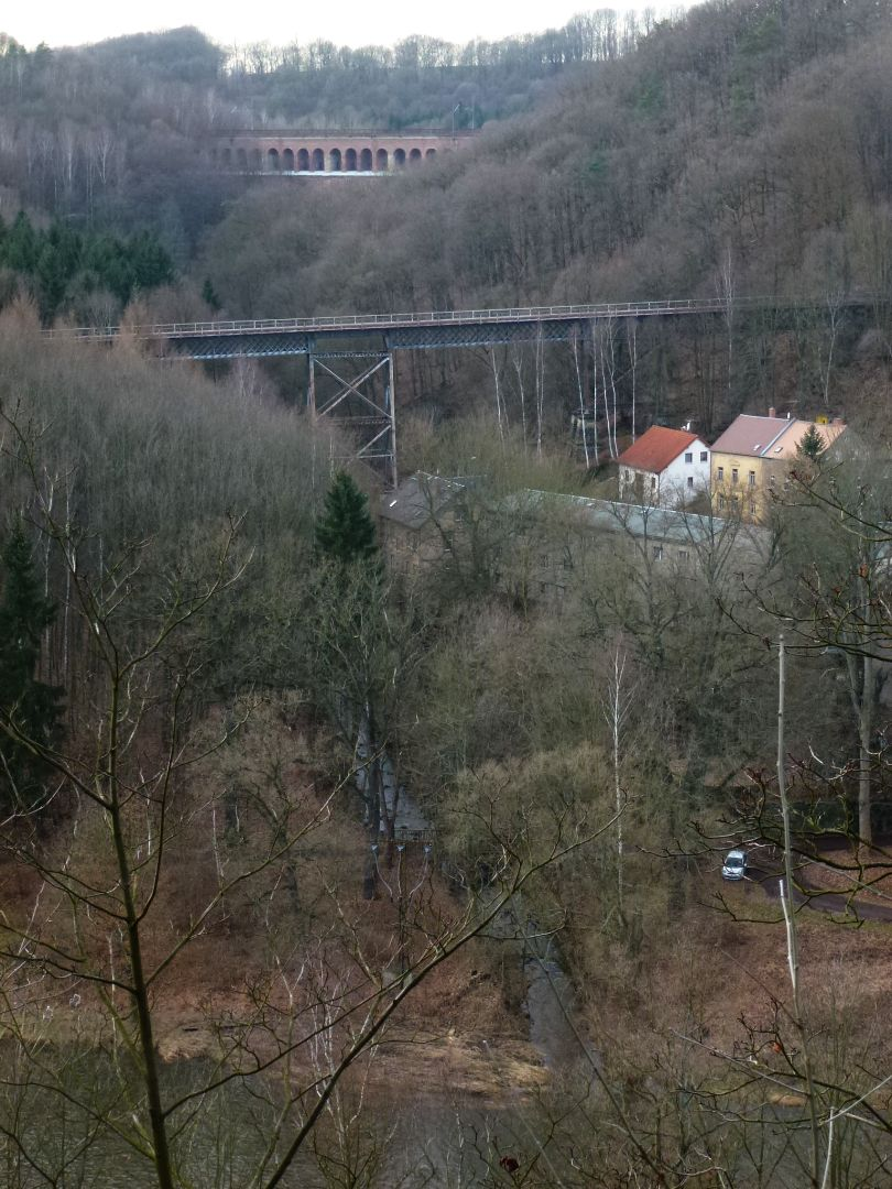 Gerüstpfeilerviadukt der Strecke Waldheim–Kriebethal (vorn) und Heiligenborner Viadukt der Strecke Riesa–Chemnitz bei Waldheim